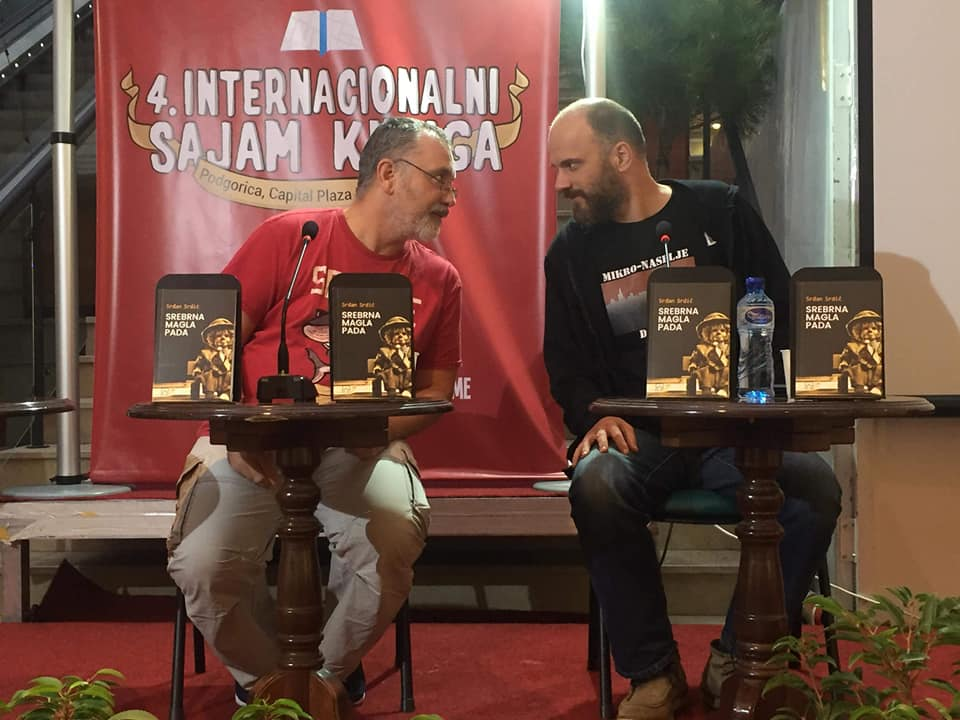 Srđan Srdić i Vladimir Arsenić u Podgorici, 2018.